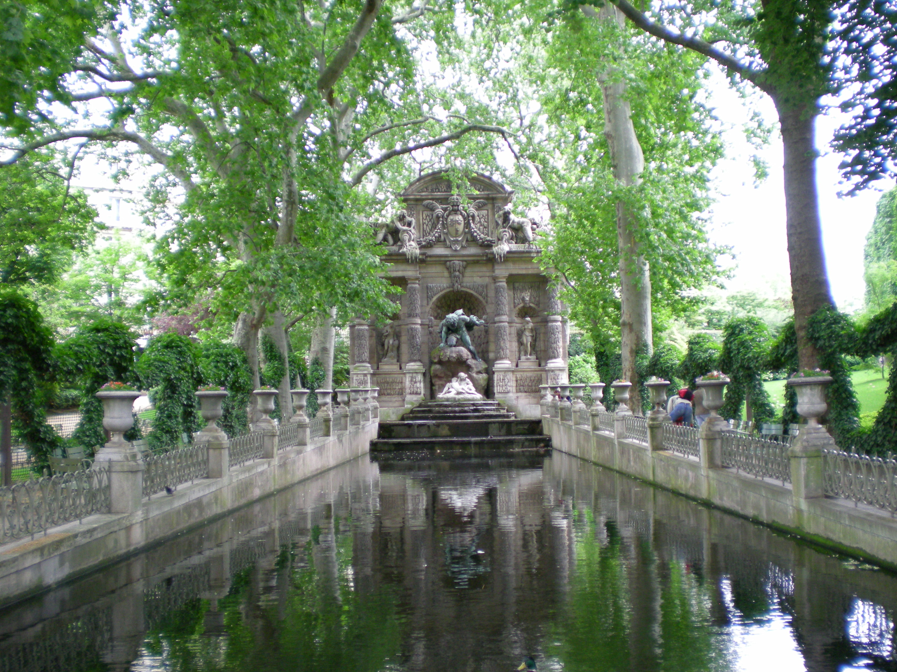 Fontaine de Médicis (1866), Paris, Jardin du Luxembourg.